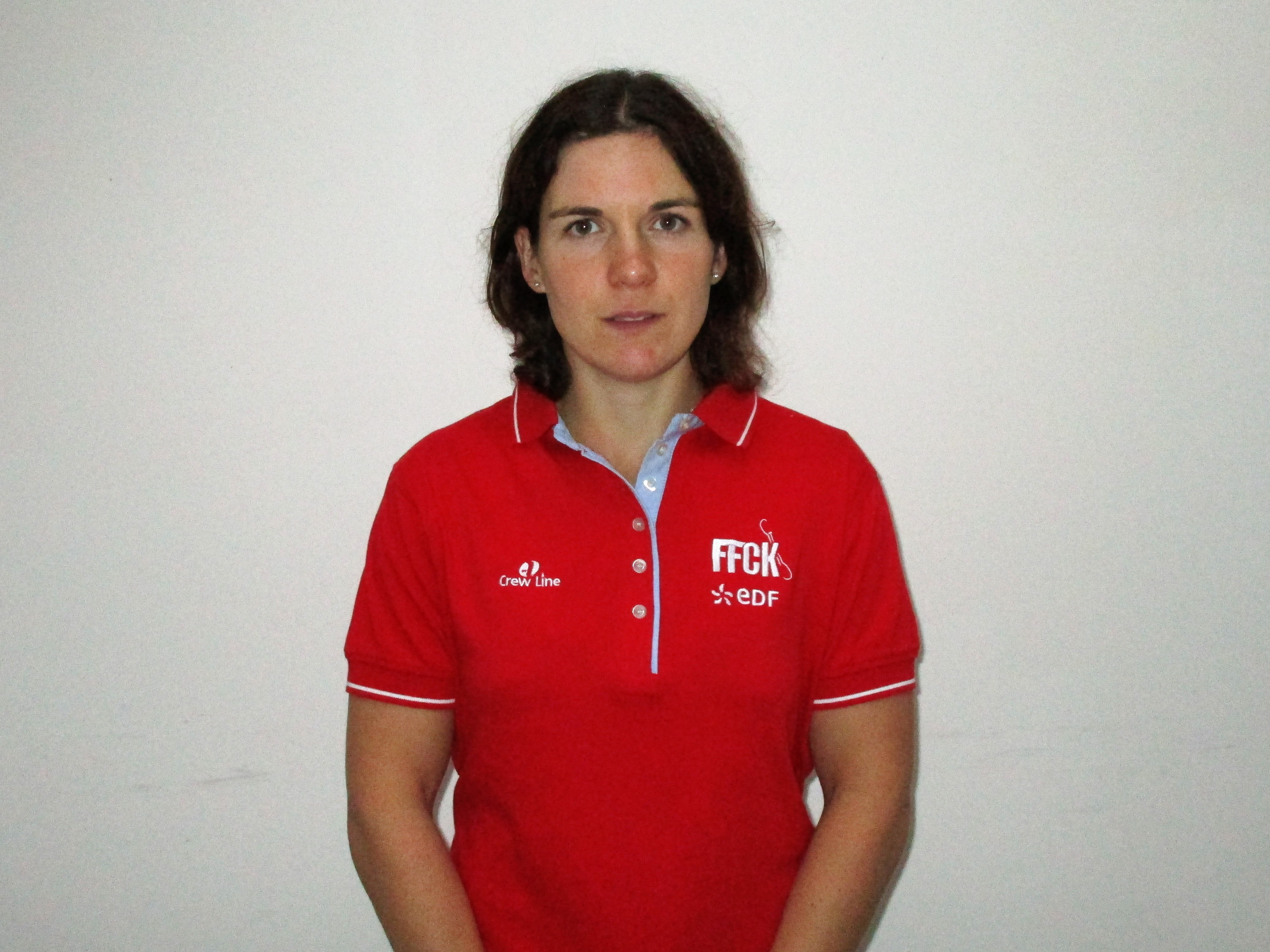 Claire BREN